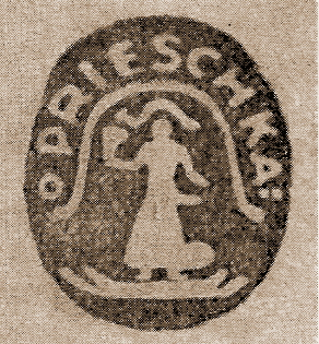 Altes Dorfsiegel von Prieschka aus dem 18./ 19. Jahrhundert.